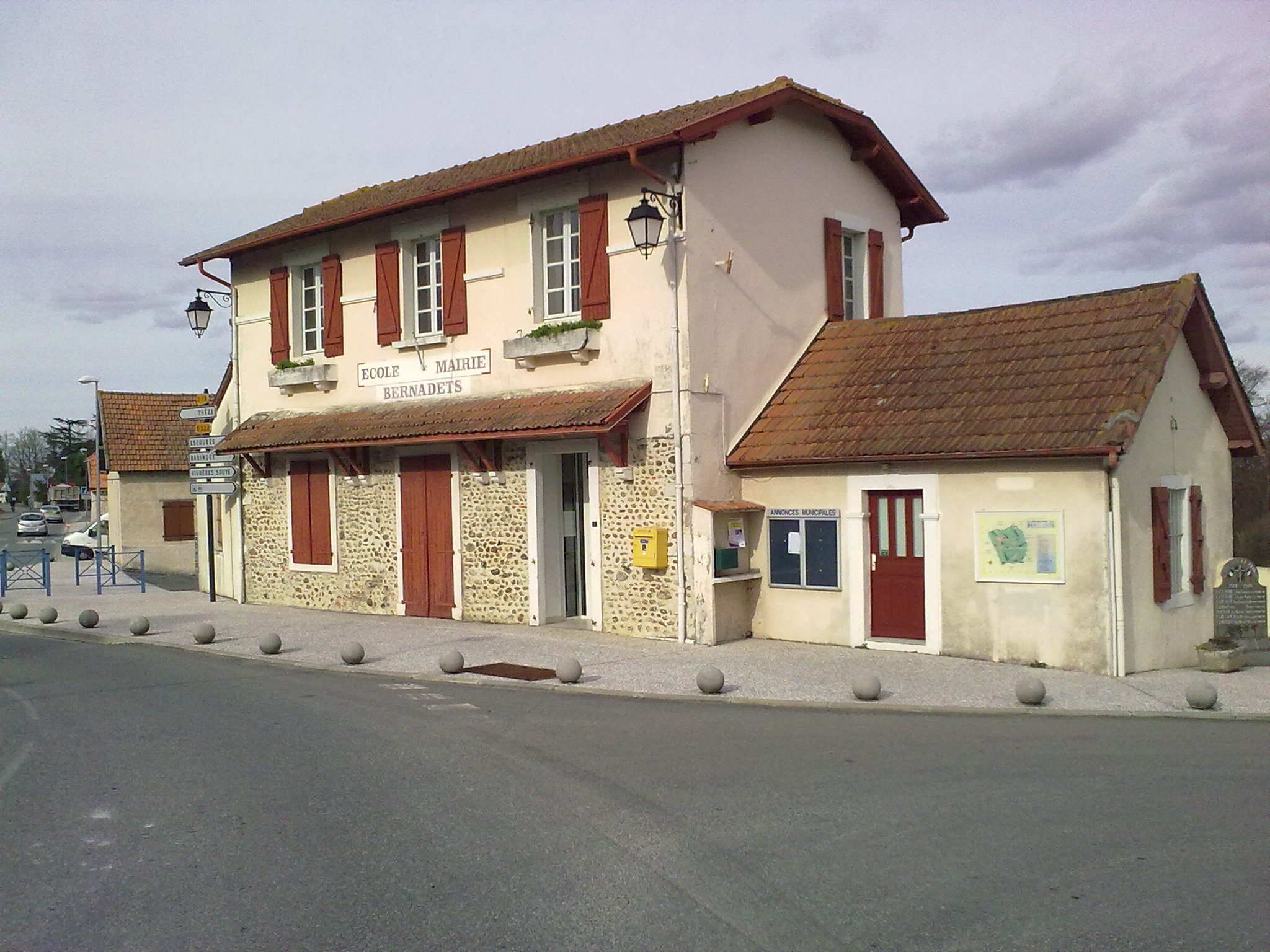 Mairie de Bernadets